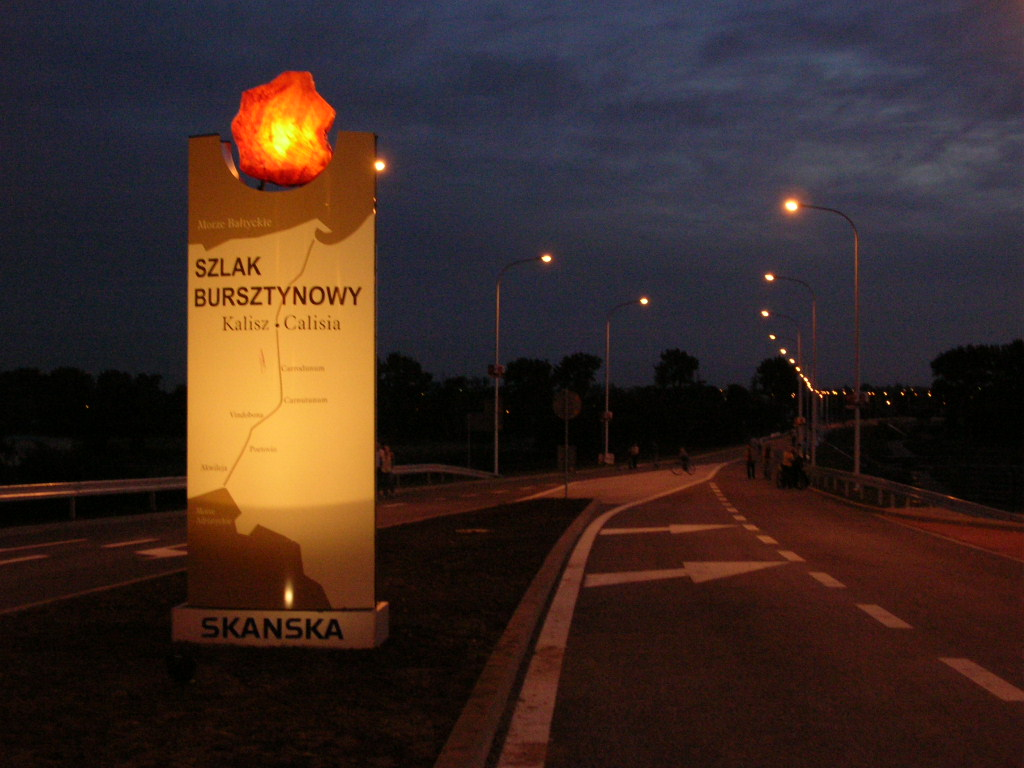 Kalisz - Trasa Bursztynowa nocą. Autor : Bartek Wawraszko (Bast)